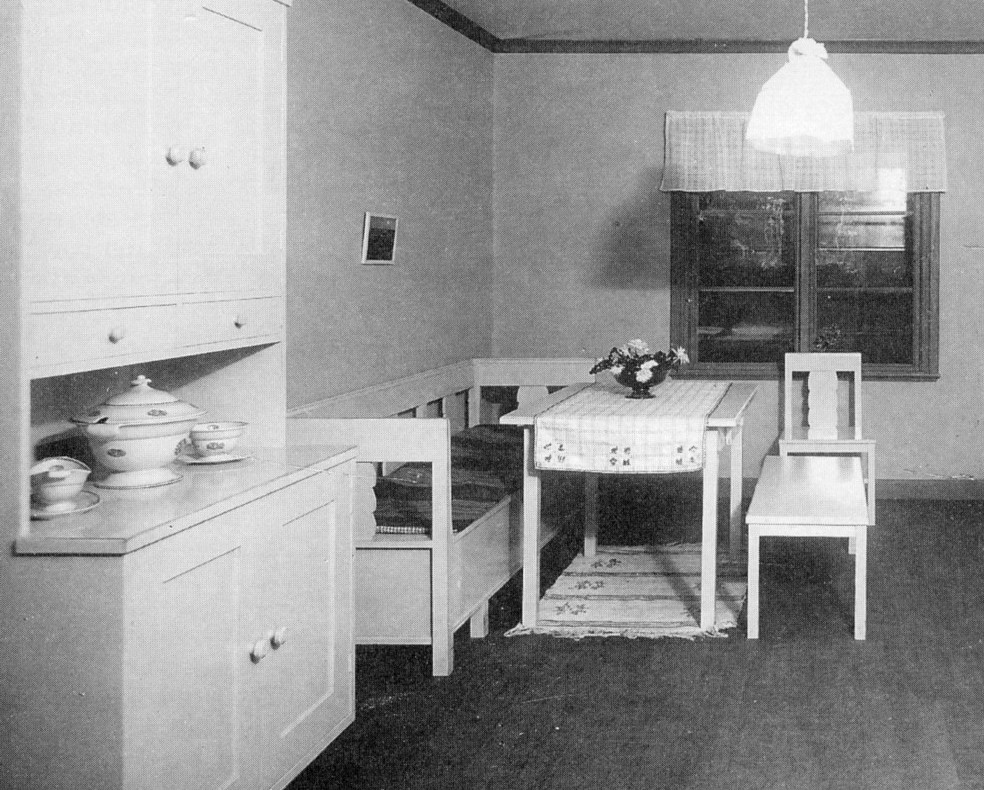 Köksinredning på "Hemutställningen 1917" på Liljevalchs konsthall i Stockholm